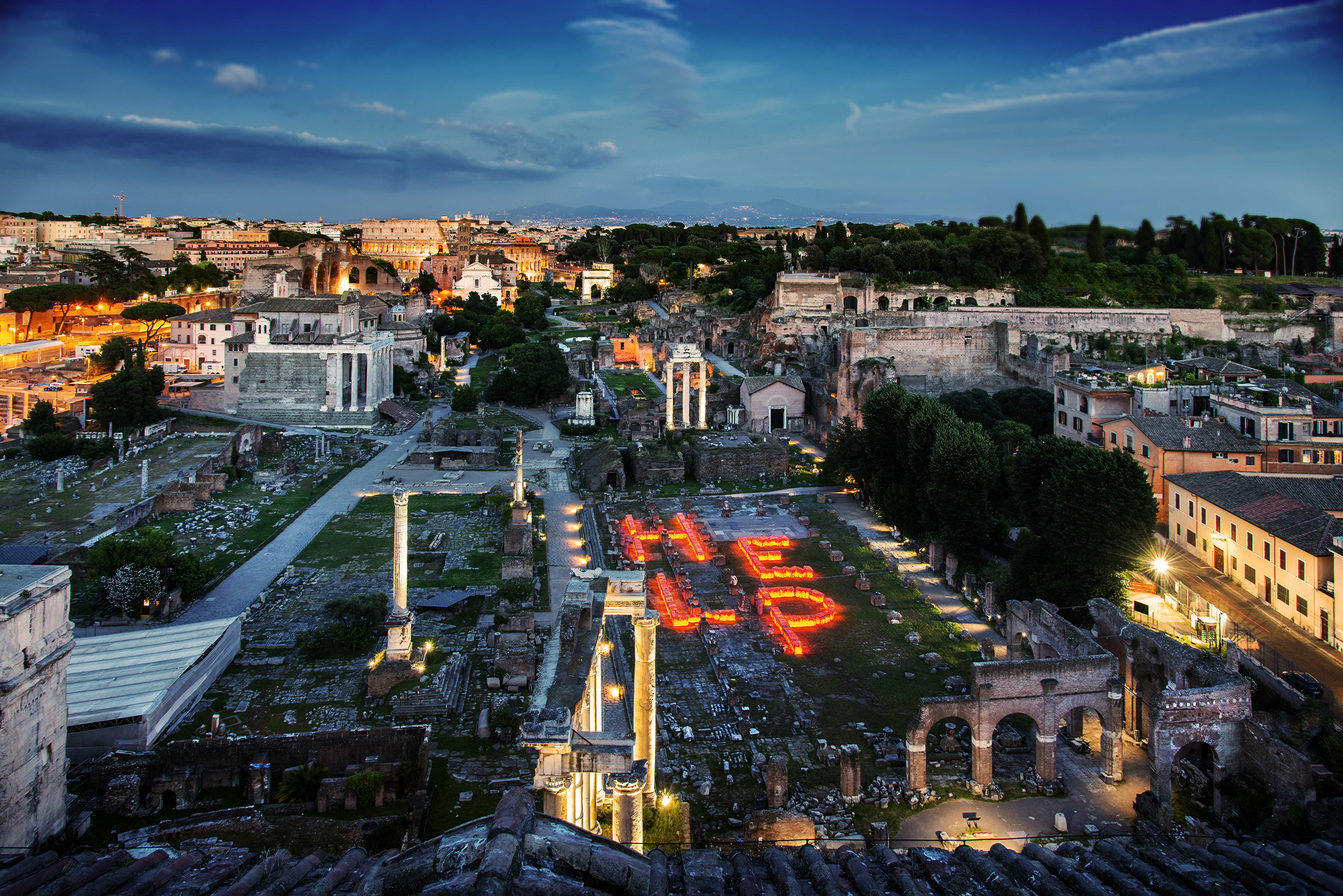 HELP the Ocean è un'opera di Maria Cristina Finucci per diffondere la problematica della spazzatura nei mari.